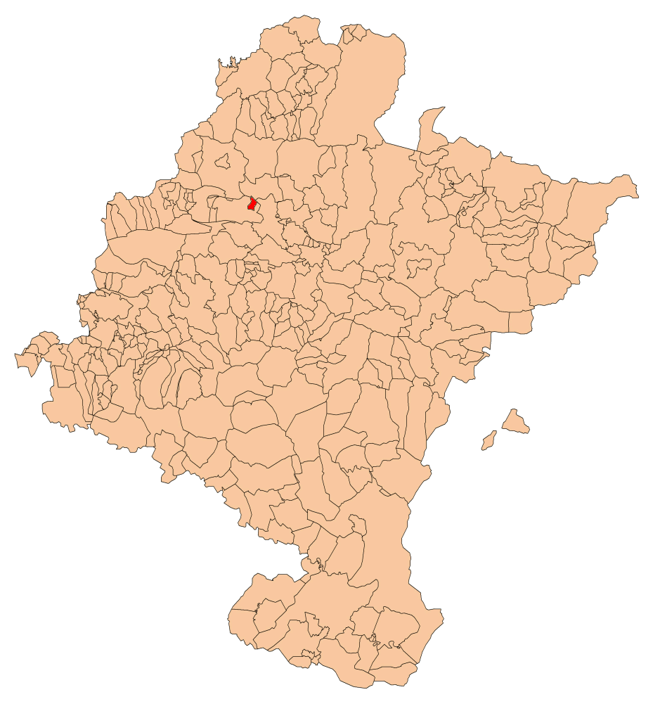 Irurtzun Nafarroako mapan kokatua.